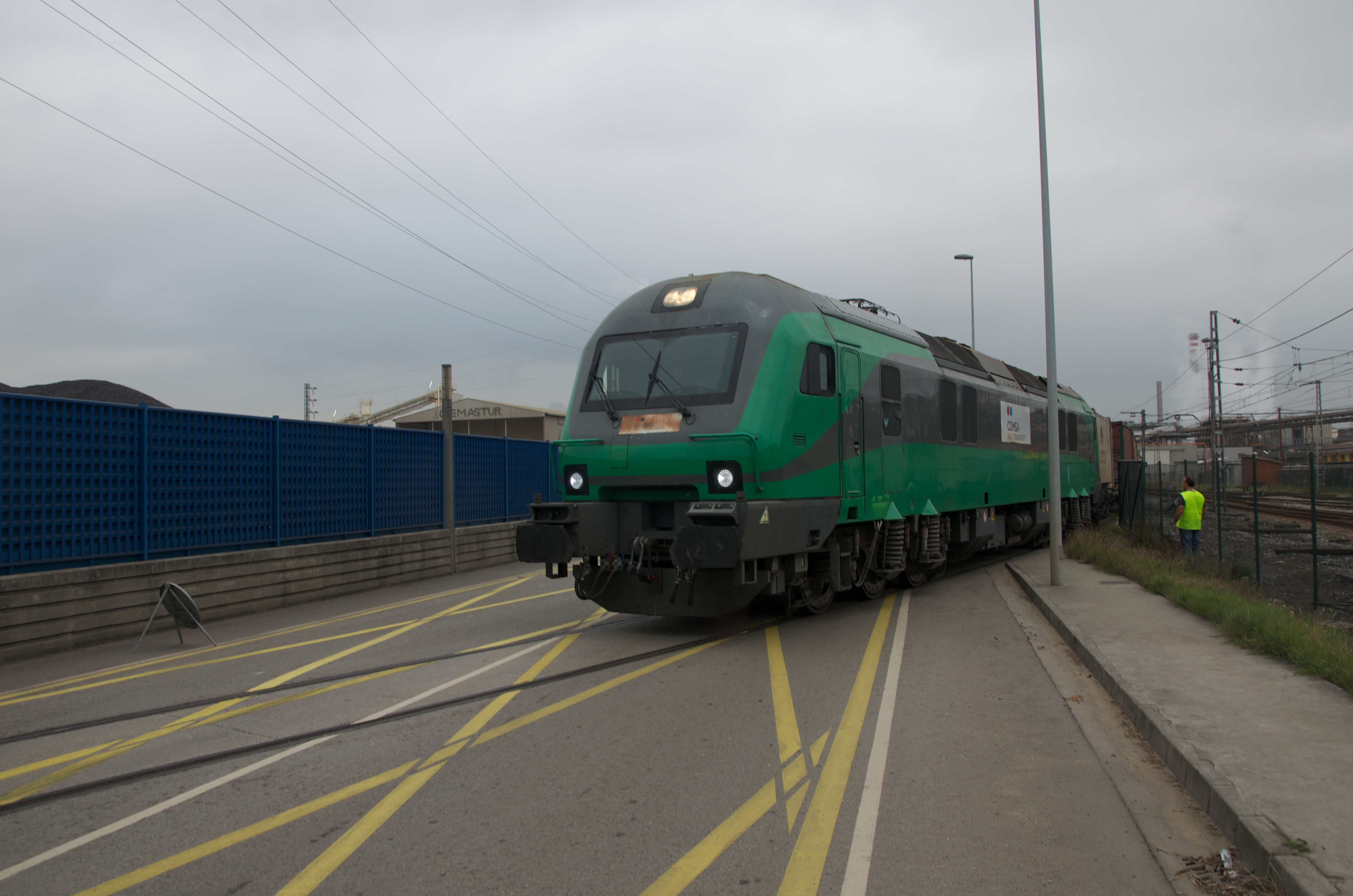 Locomotora electro-diésel de Comsa.